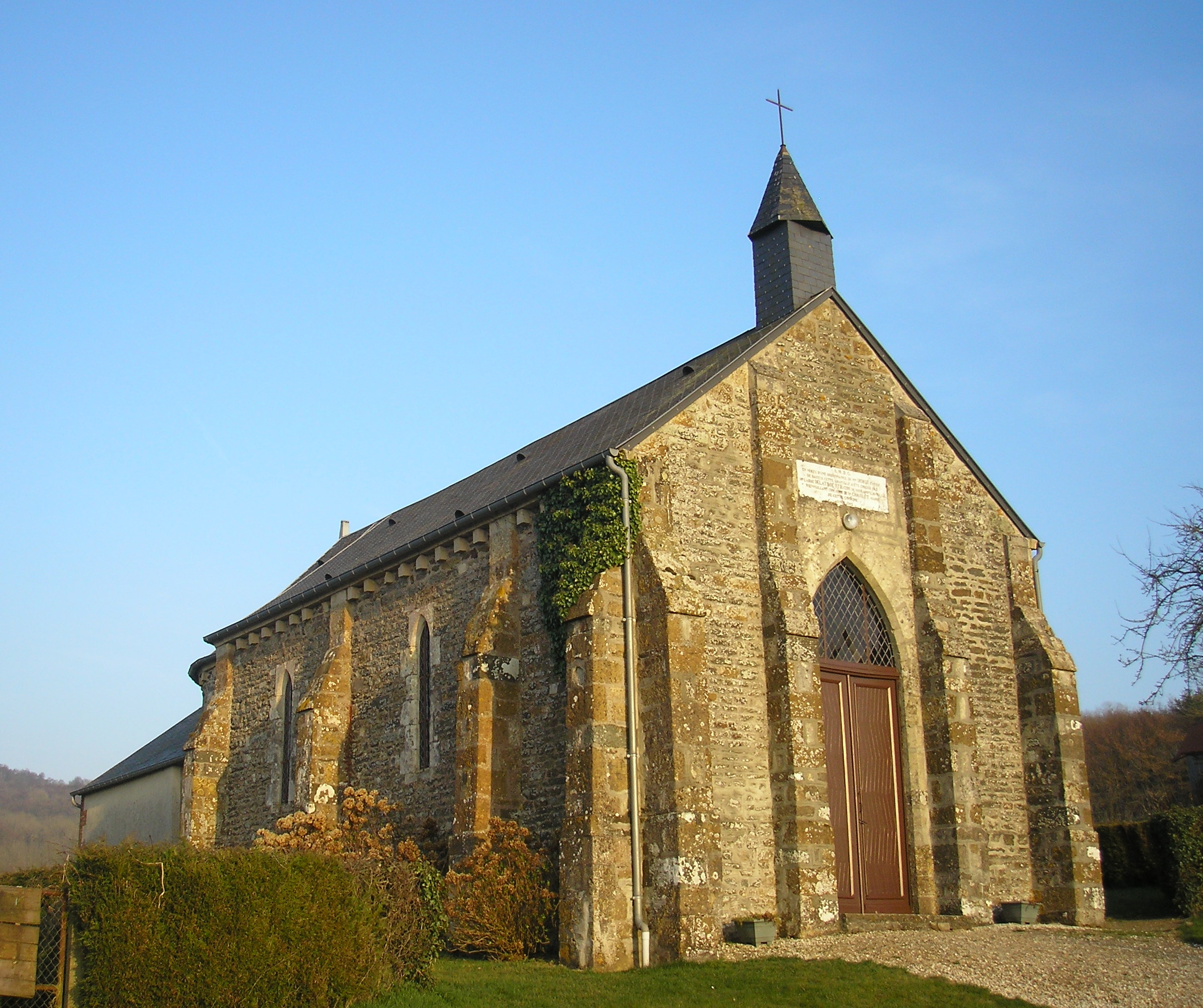 Roucamps (Normandie, France). La chapelle Saint-Célerin